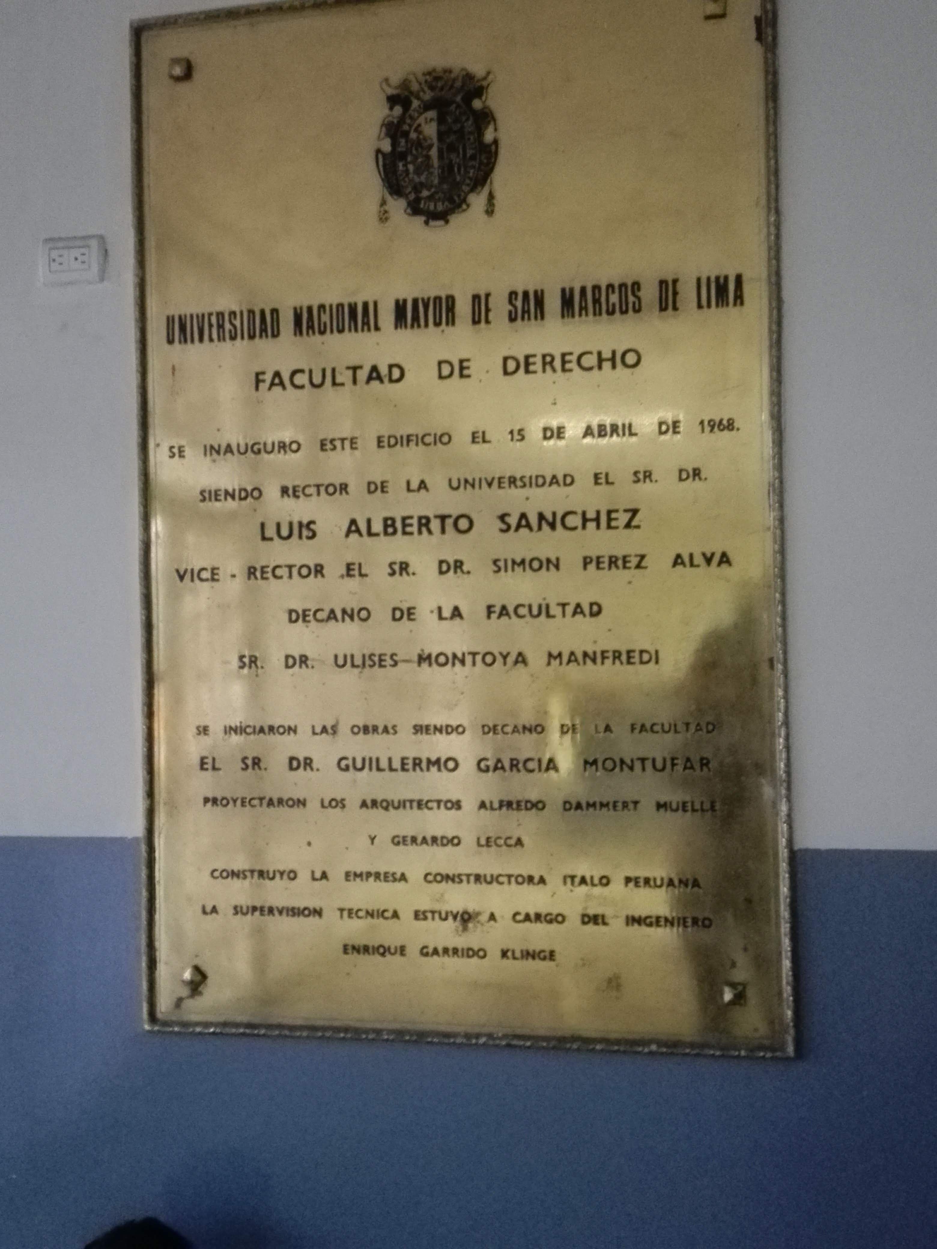 La placa de la Escuela Profesional de Derecho describe el año de fundación de la escuela así como el rector y decano de la época, esta se encuentra en el hall de la FDCP